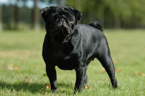 Mopshond teefje, zwart